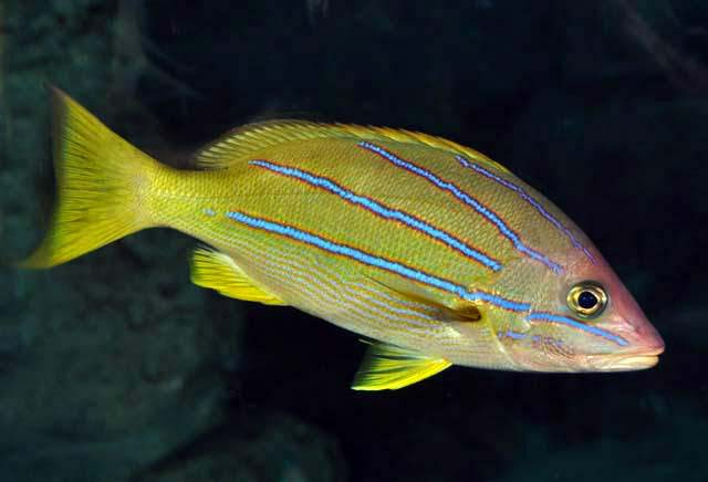 Lutjanus viridis (Birch Aquarium)